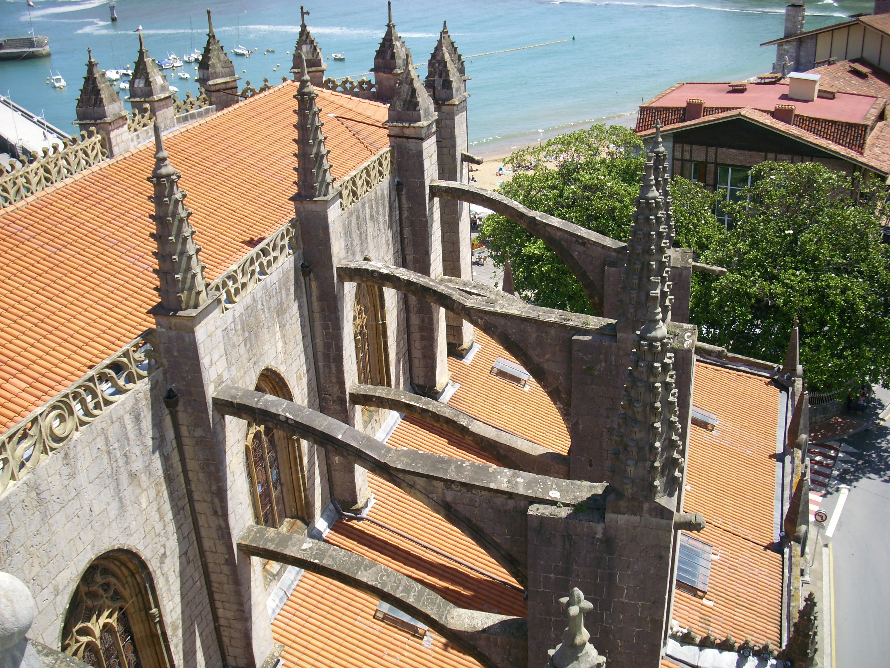 arbotantes de doble trazado, en la Basílica de la Asunción de Nuestra Señora de Lequeitio (Vizcaya, País Vasco, España)